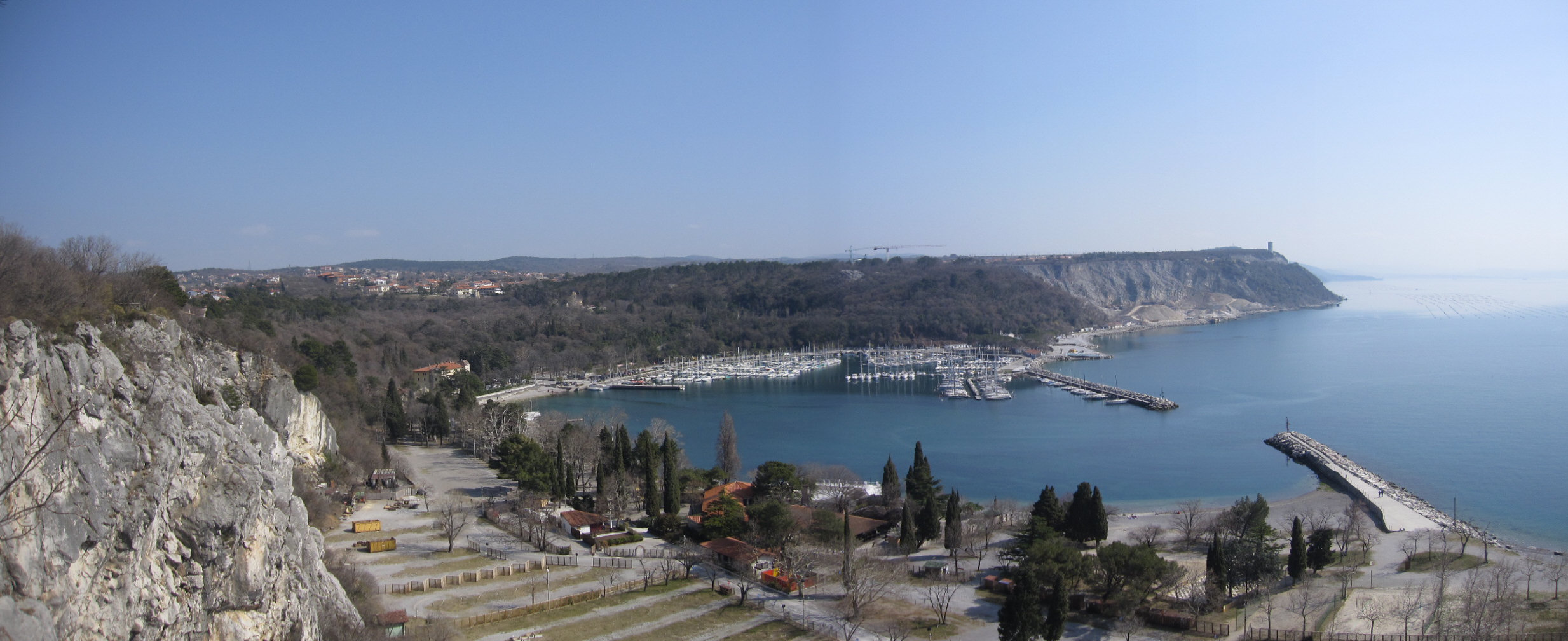 Sesljan/Sistiana z marino